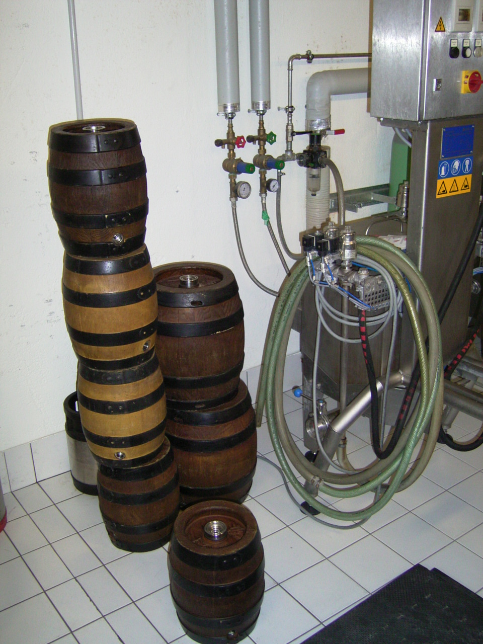 Keller öufi bier solothurn